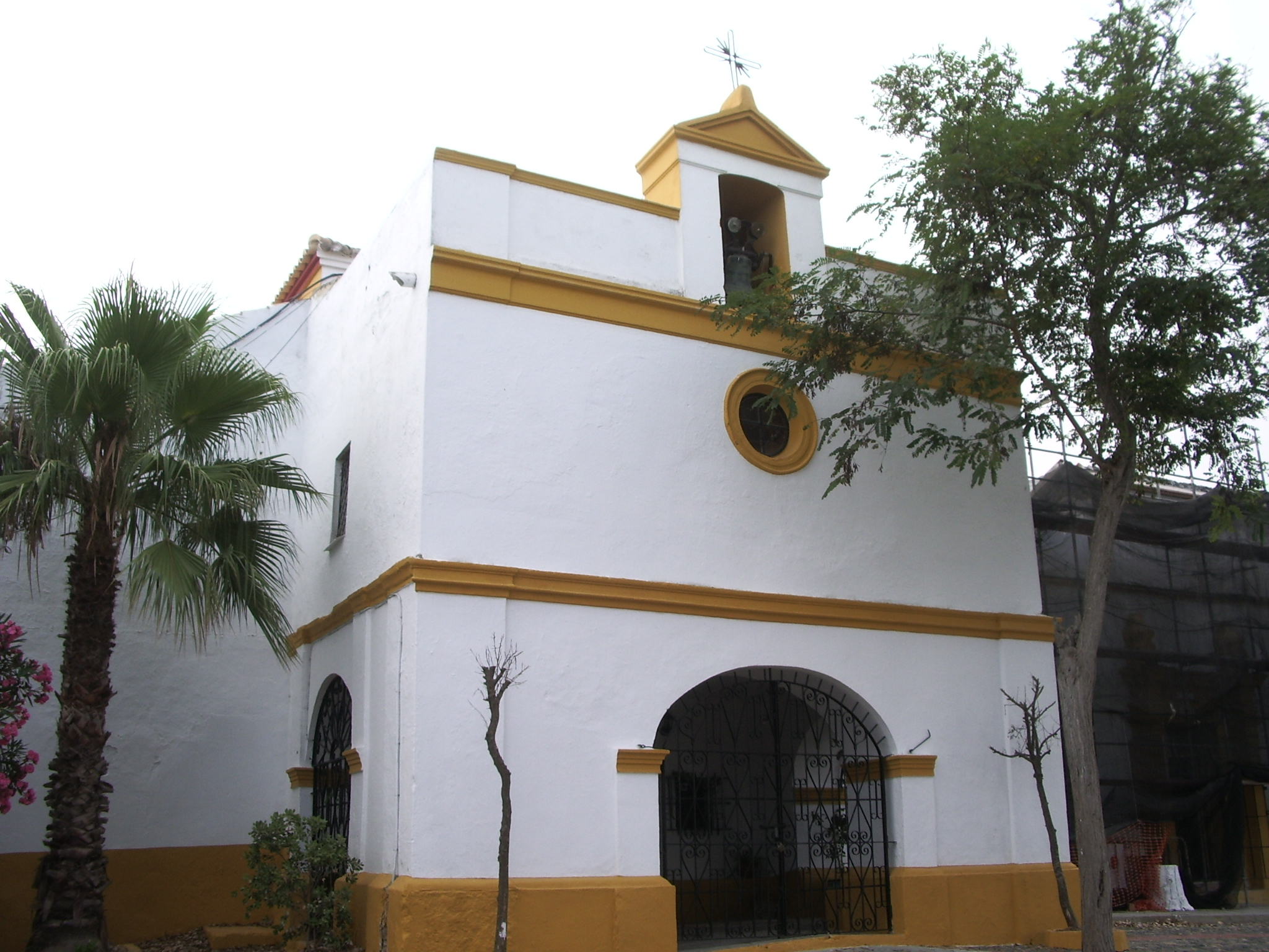 Vista de la ermita de San Antonio en Ceuta